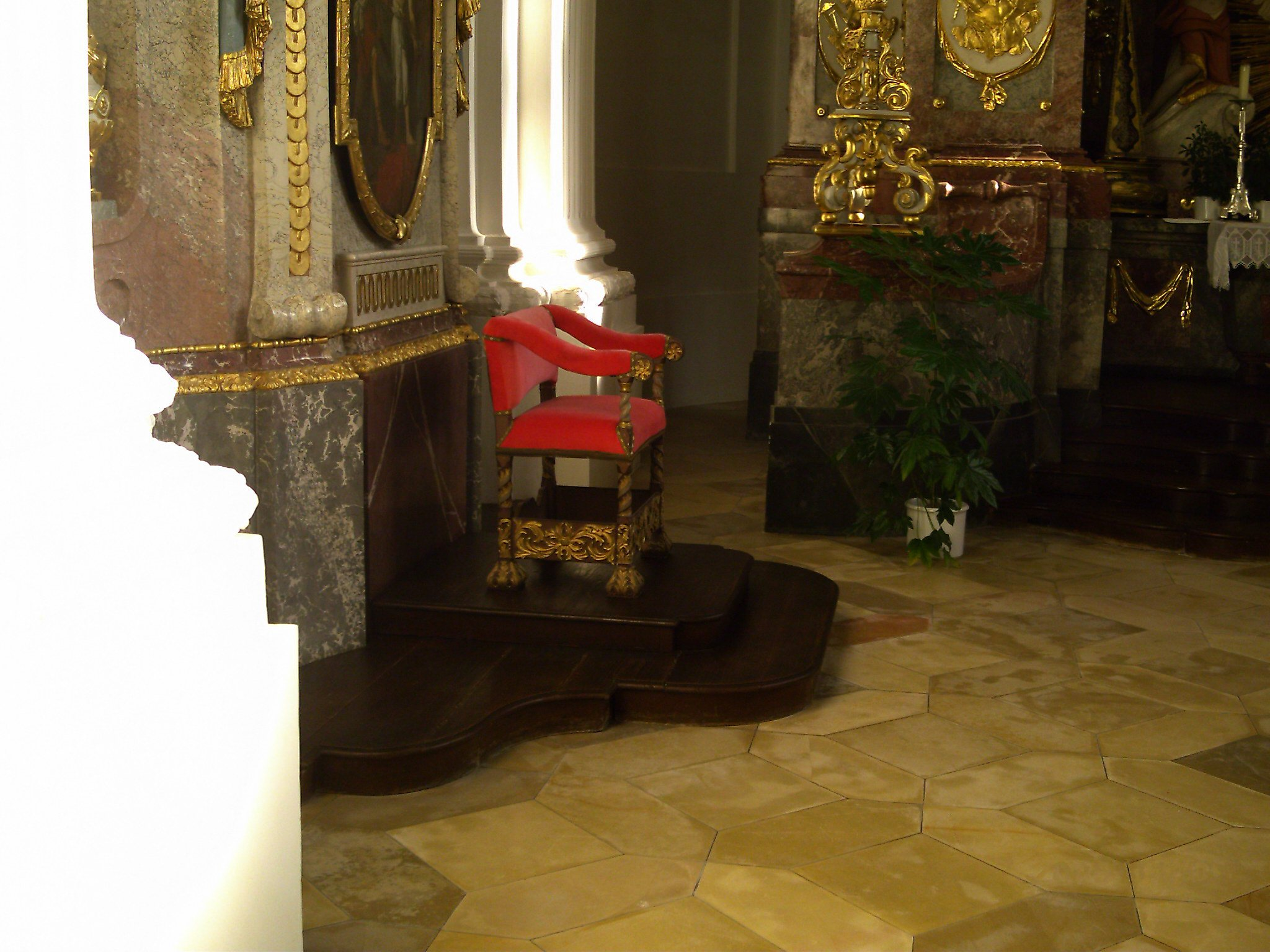 Stuhl der Reichsabtes der Prämonstratenser in der Reichsabtei 88430 Rot an der Rot, Deutschland